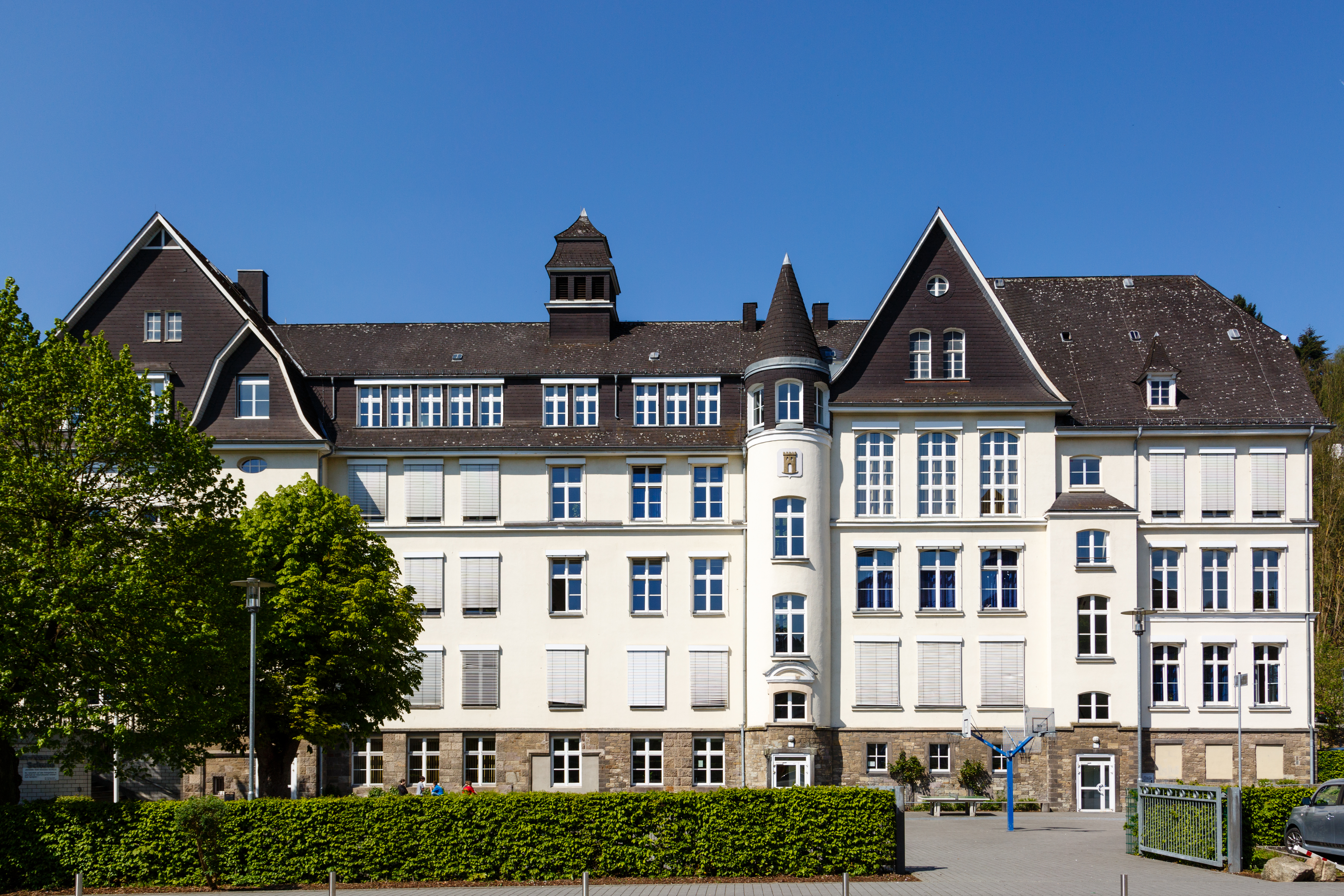 Dillenburg - Johann-von-Nassau-Schule